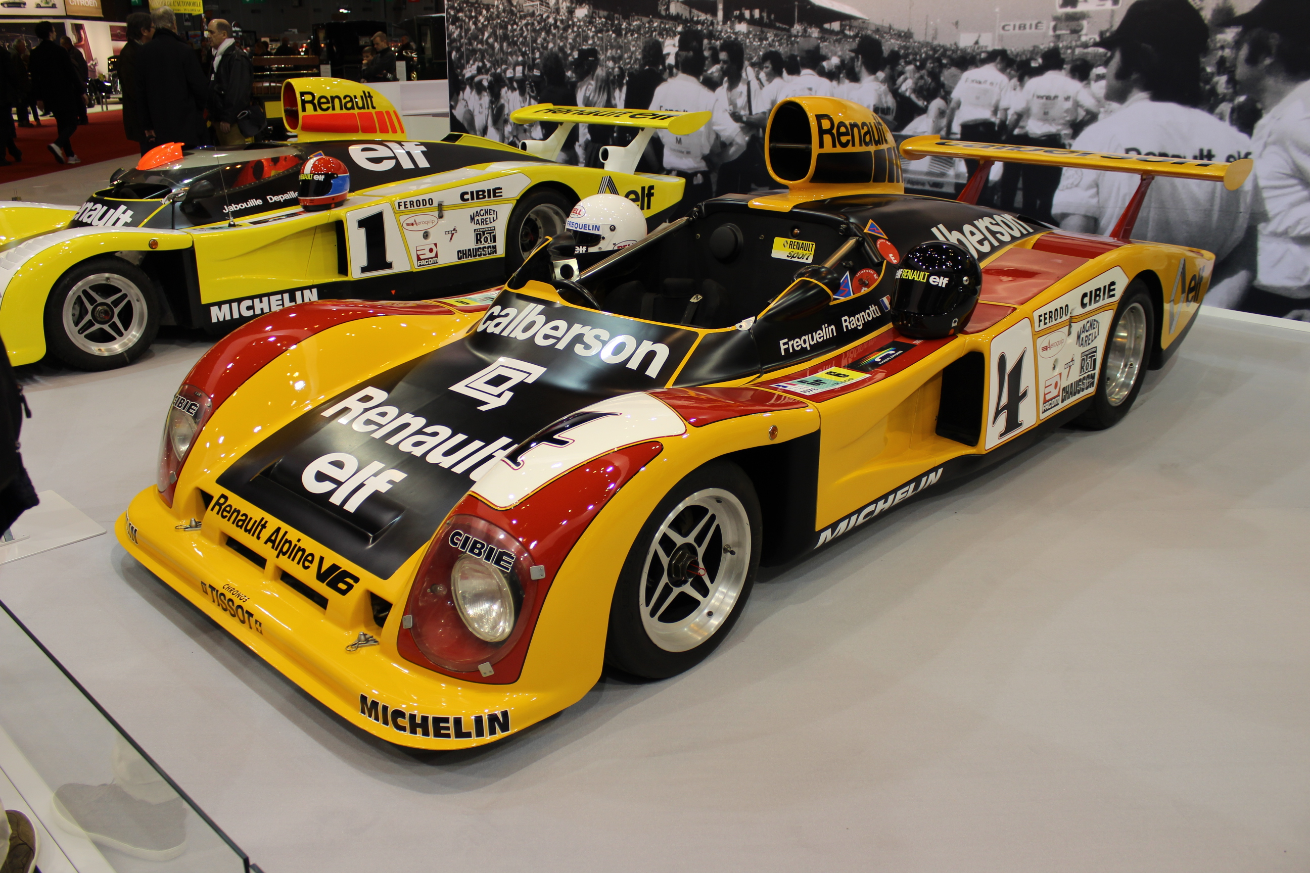 Rétromobile 2018 - 120 ans de Renault